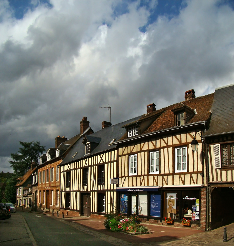 Lyons-la-Forêt, Eure, Normandie, France.